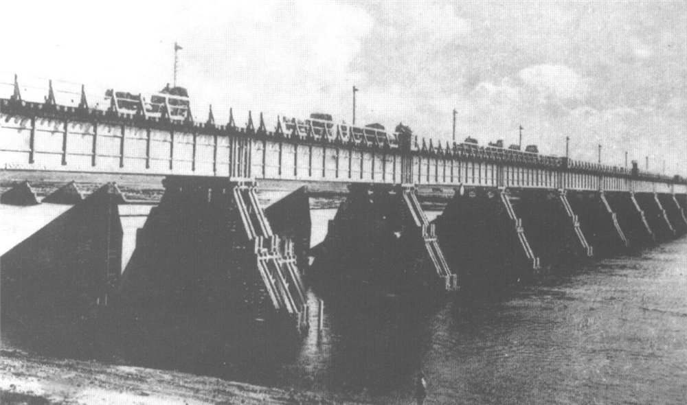 Гайковский мост